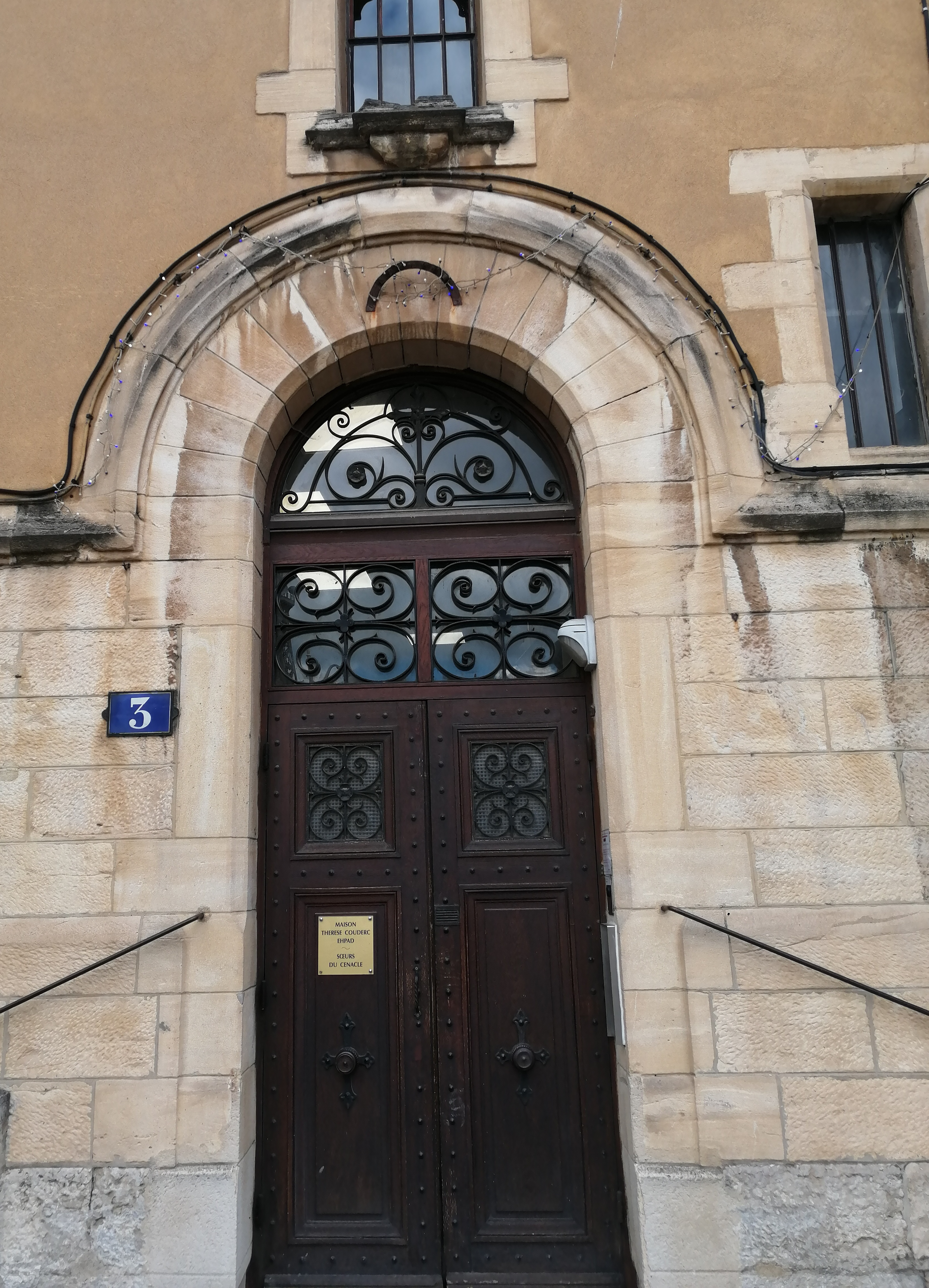 Porte de la Maison Thérèse Couderc, soeur du Cénacle à Lyon